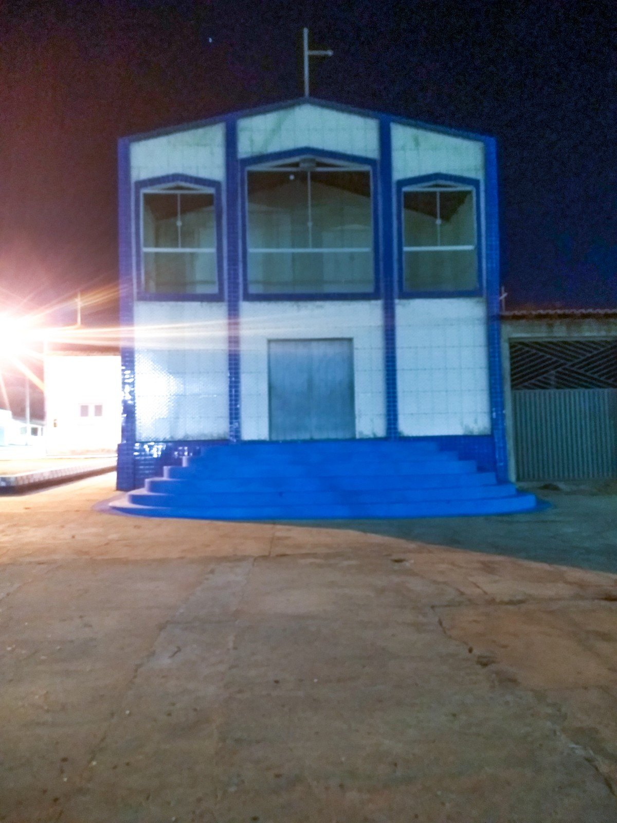 imagem da igreja de madragoa